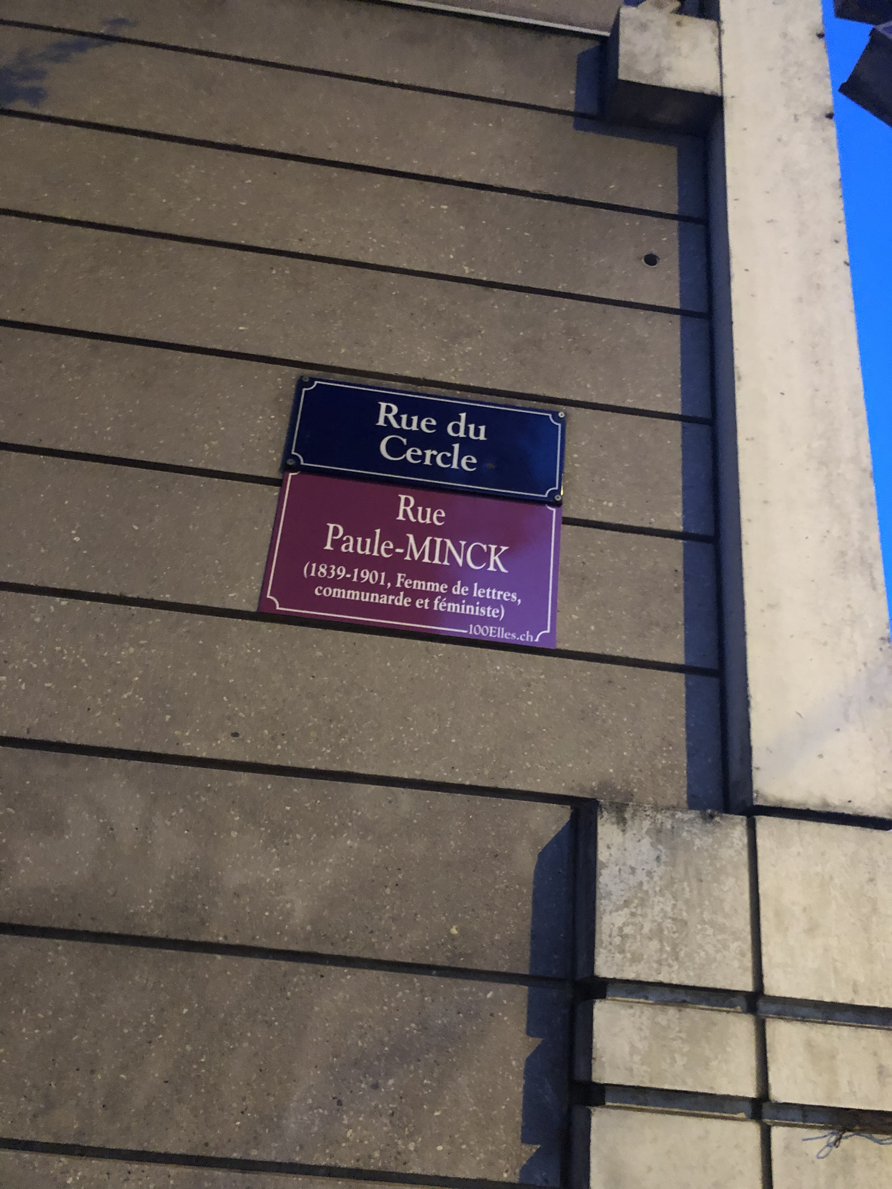 Renommage de rue Paule Minck à Fenève